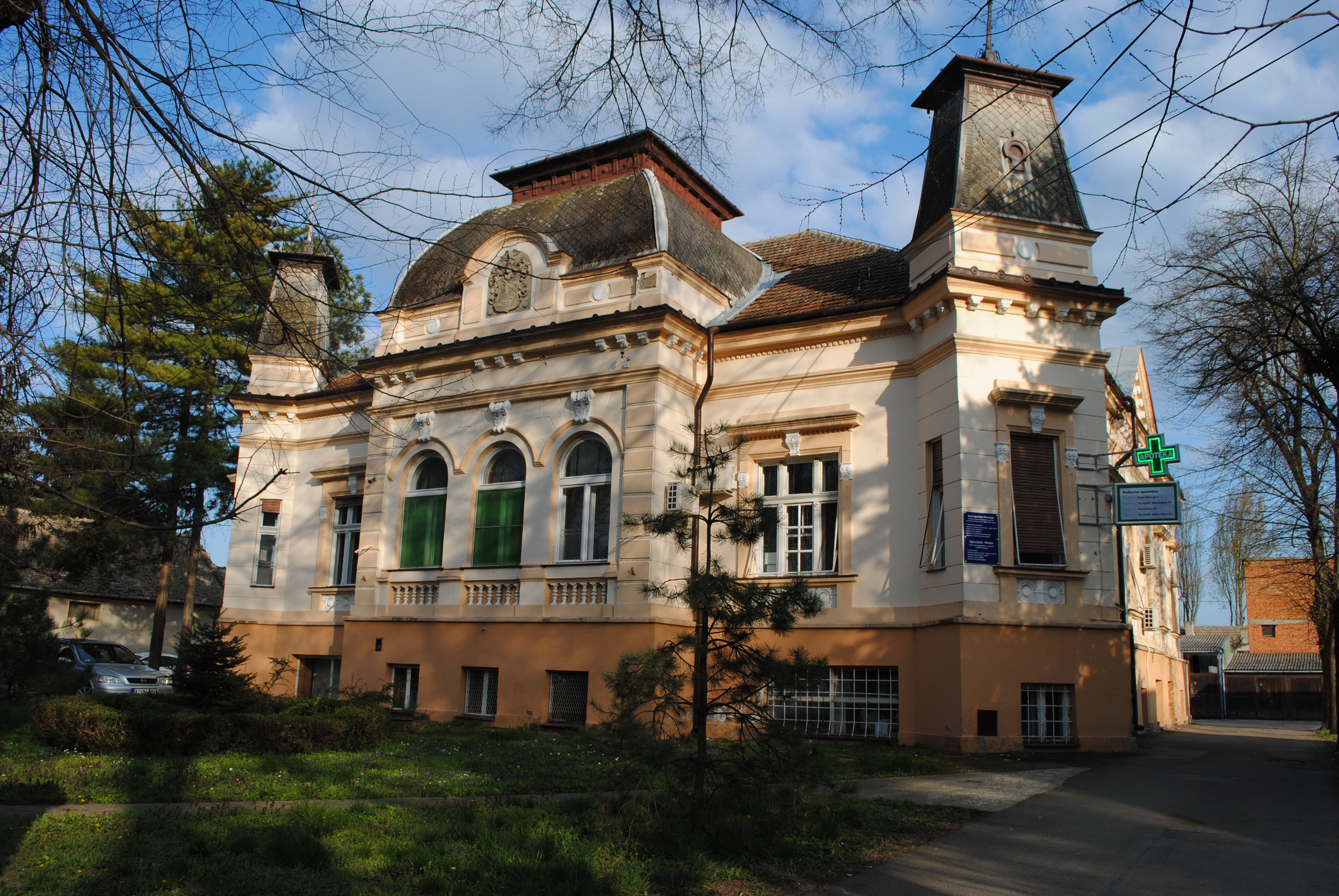 Vila Rizenfelder, danas reonski dispanzeri i služba Hitne pomoći